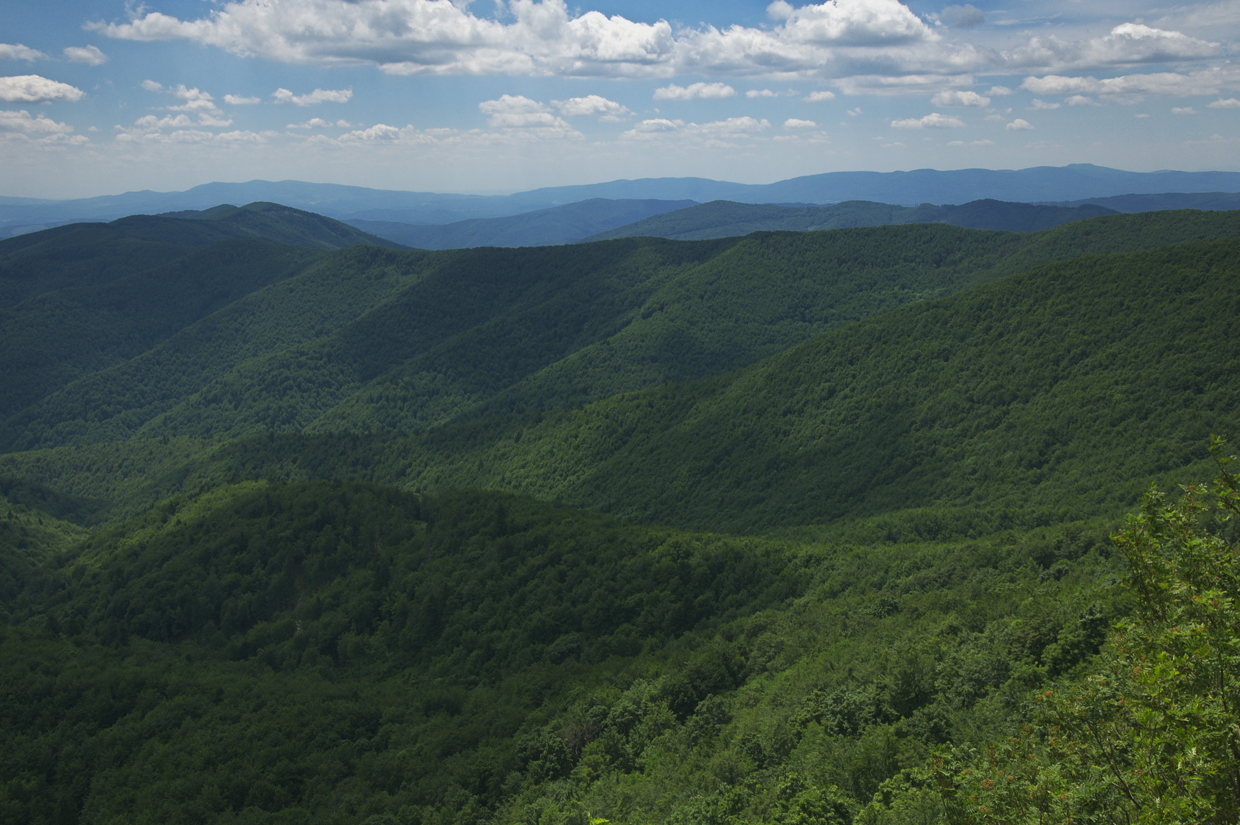 Národná prírodná rezervácia Jarabá skala, Národný park Poloniny